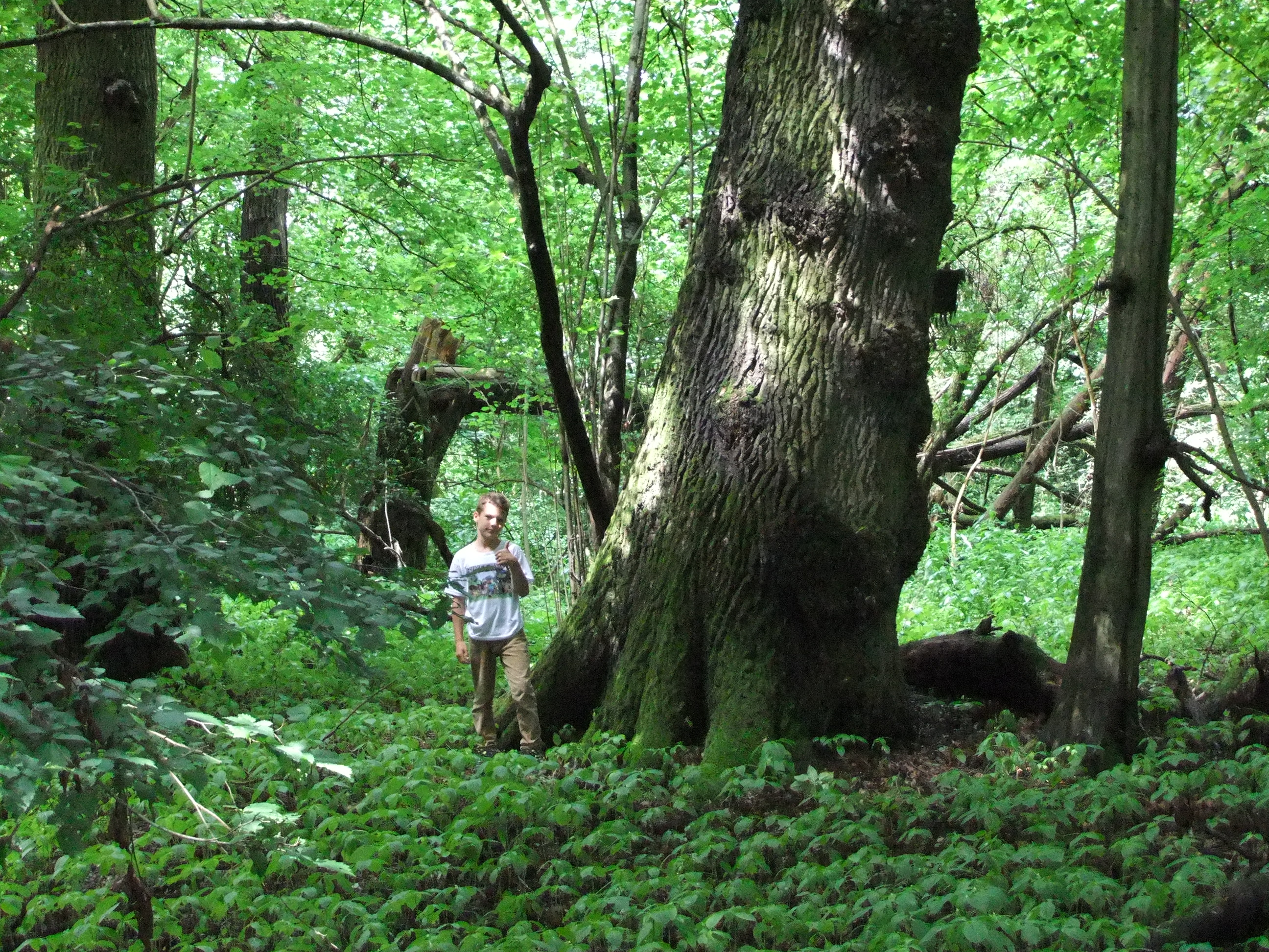 Mit 4,30 Metern Stammumfang und einem Durchmesser von 1,60 Metern die älteste Eiche im Enkheimer Wald - im menschlichen Größenverhältnis